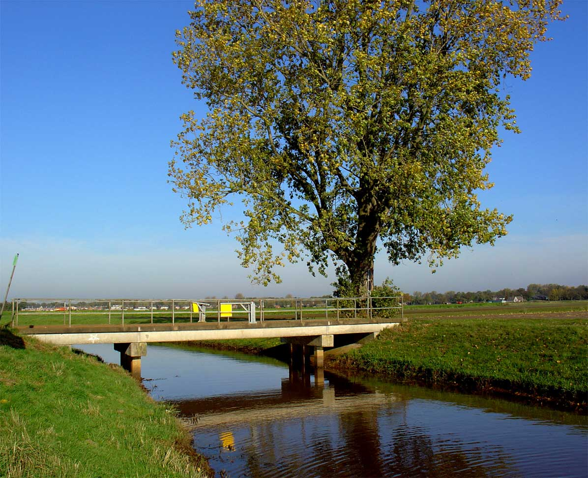 Schoonebeekerdiep of Grenz Aa